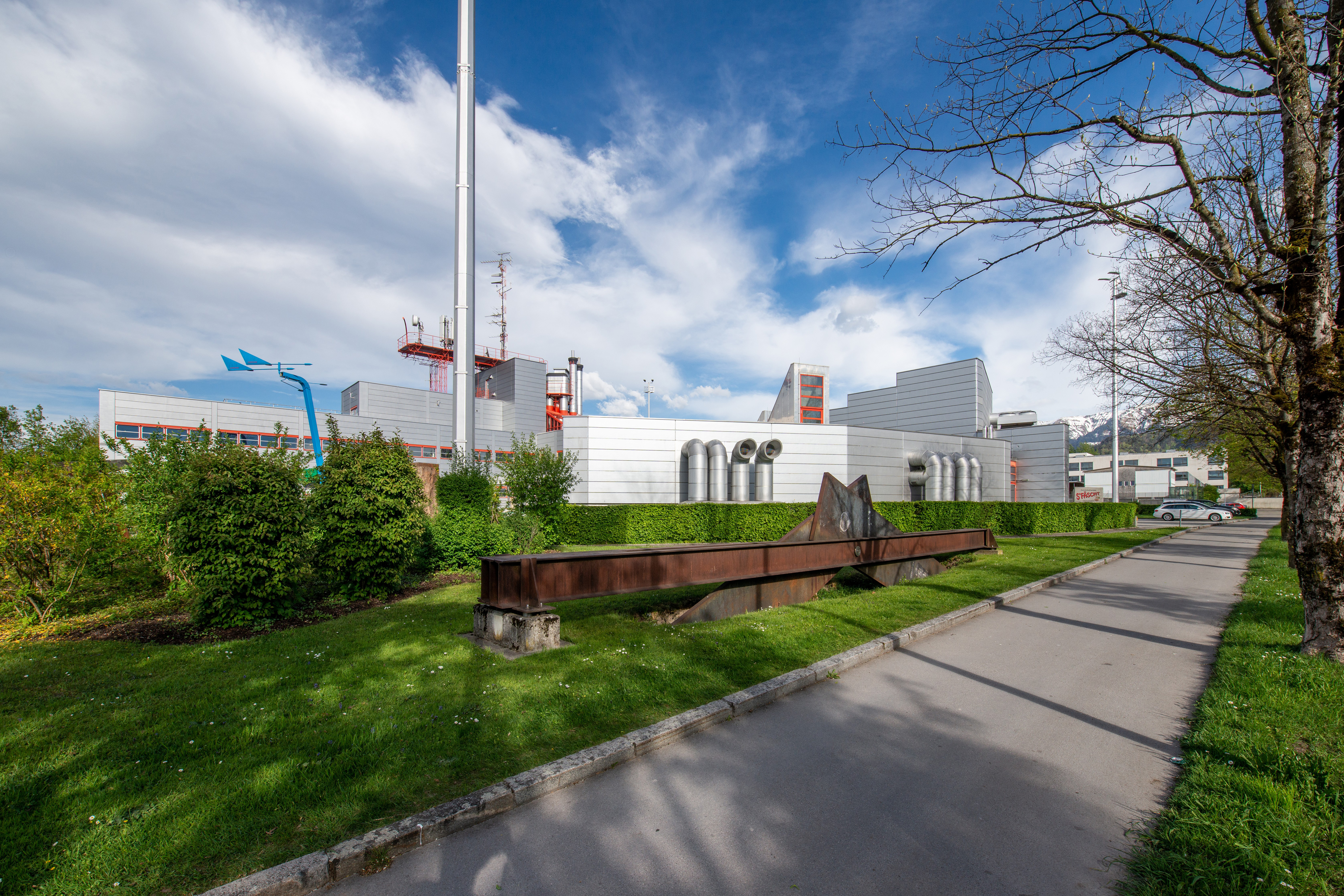 Österreichischer Rundfunk, ORF-Landesstudio Vorarlberg in Dornbirn. Ein Werk des Achitekten Gustav Peichl.